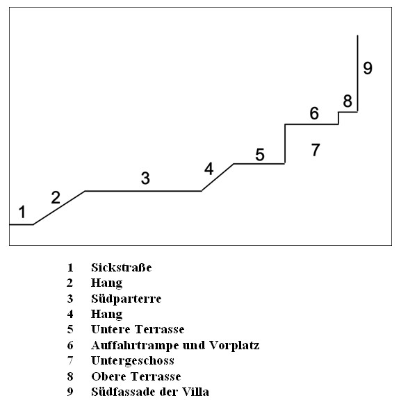 Geländequerschnitt von der Sickstraße zur Mitte der Südfassade der Villa Berg in Stuttgart, unmaßstäbliche Schemazeichnung.